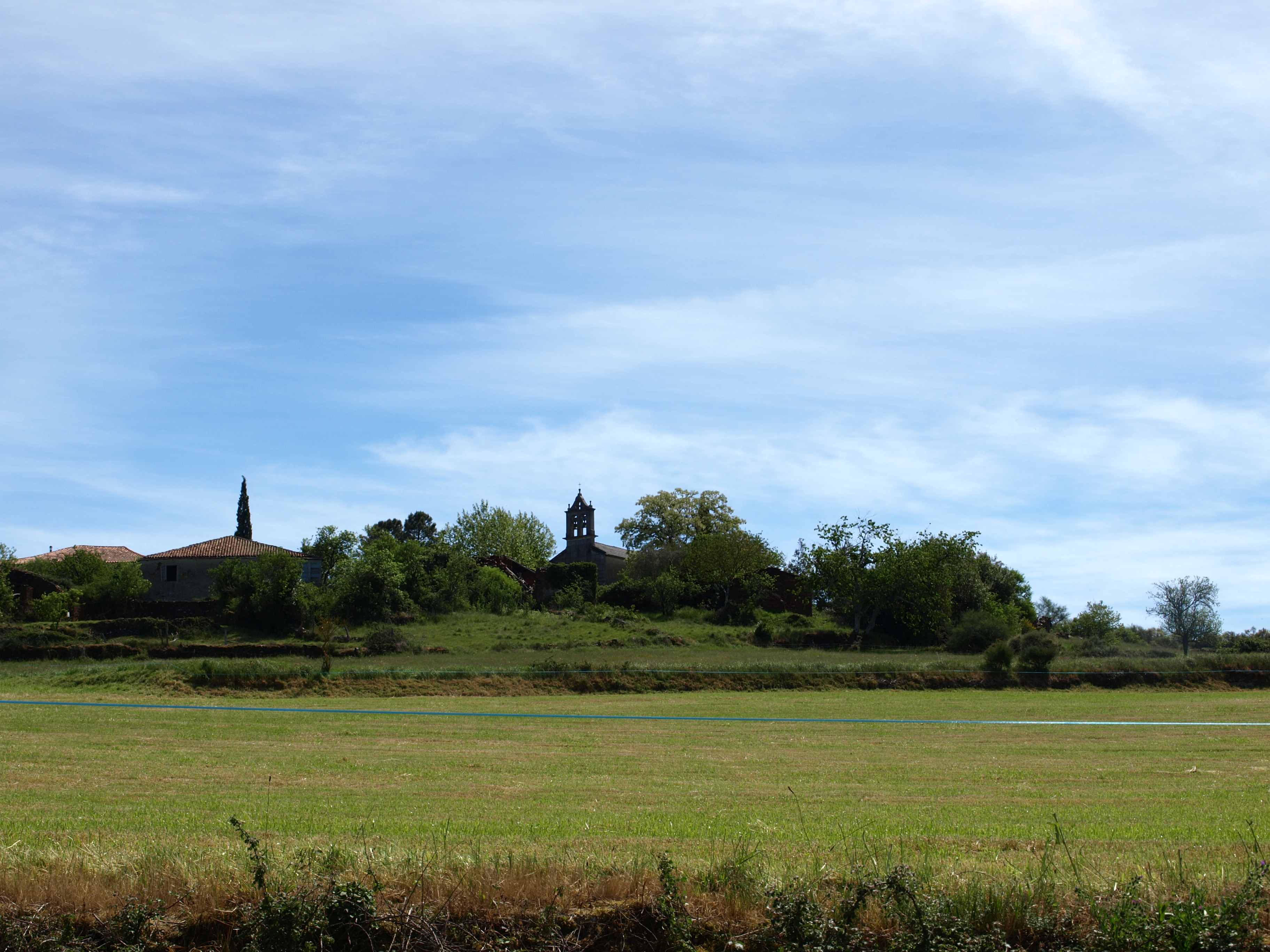 San Vicente de Eirexafeita (O Saviñao). Vistas